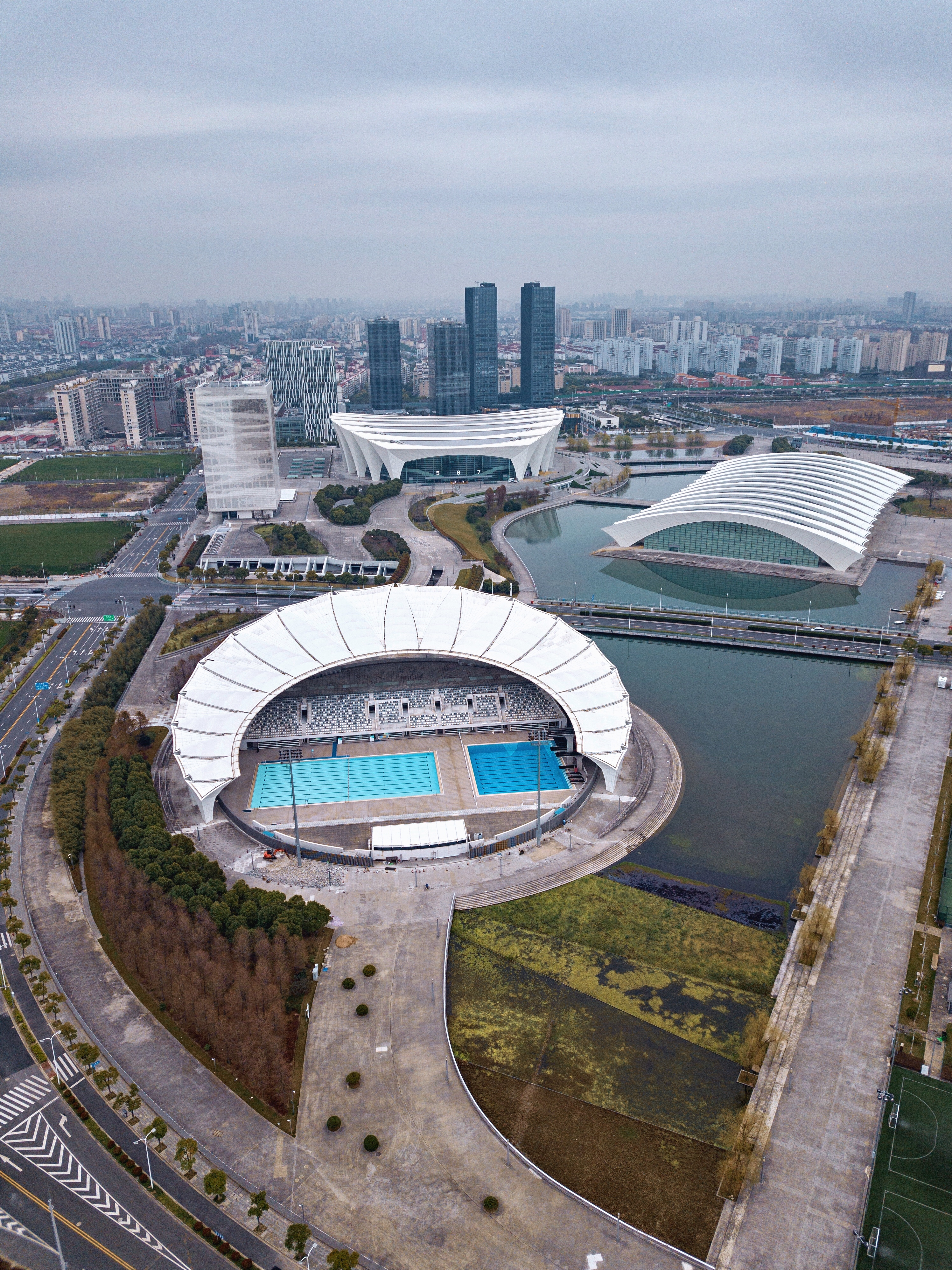 中文（中国大陆）: 东方体育中心全景